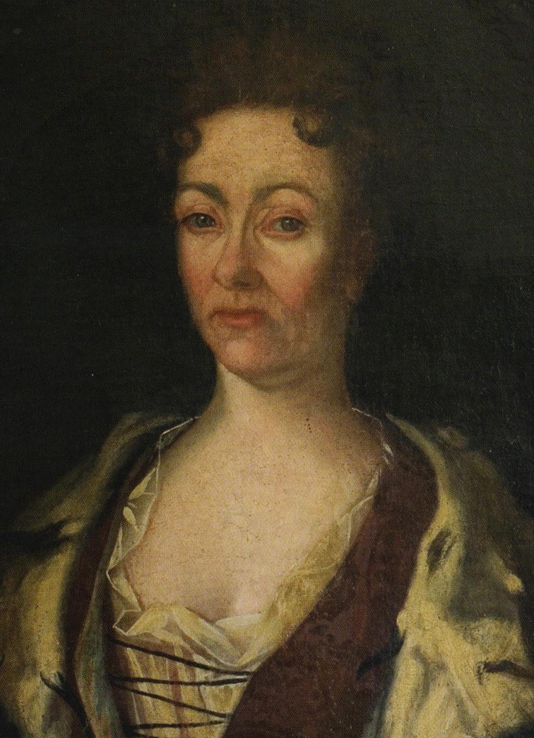 Sofia Drake af Torp och Hamra gift med Jon Stålhammar